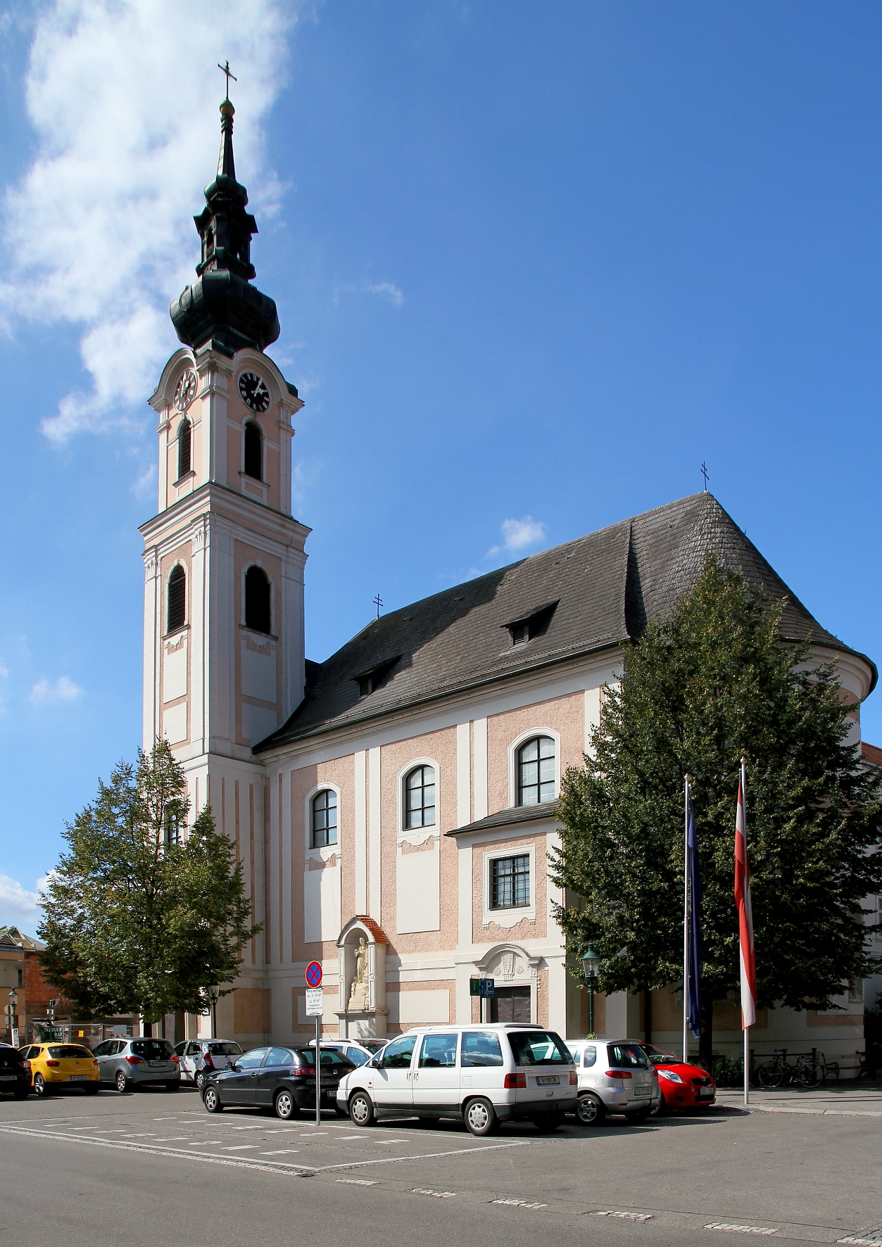 Die ehemalige Klosterkirche hl. Johannes Nepomuk der Minoriten in der niederösterreichischen Stadt Tulln an der Donau.